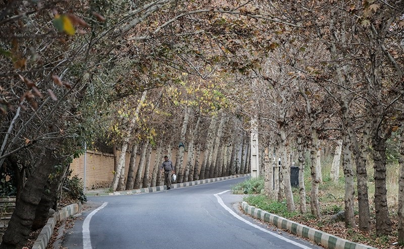 اُزگل